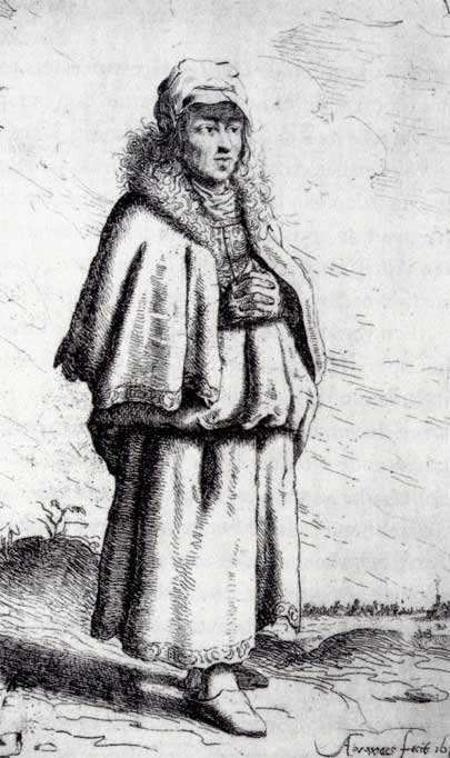 Beggarwoman